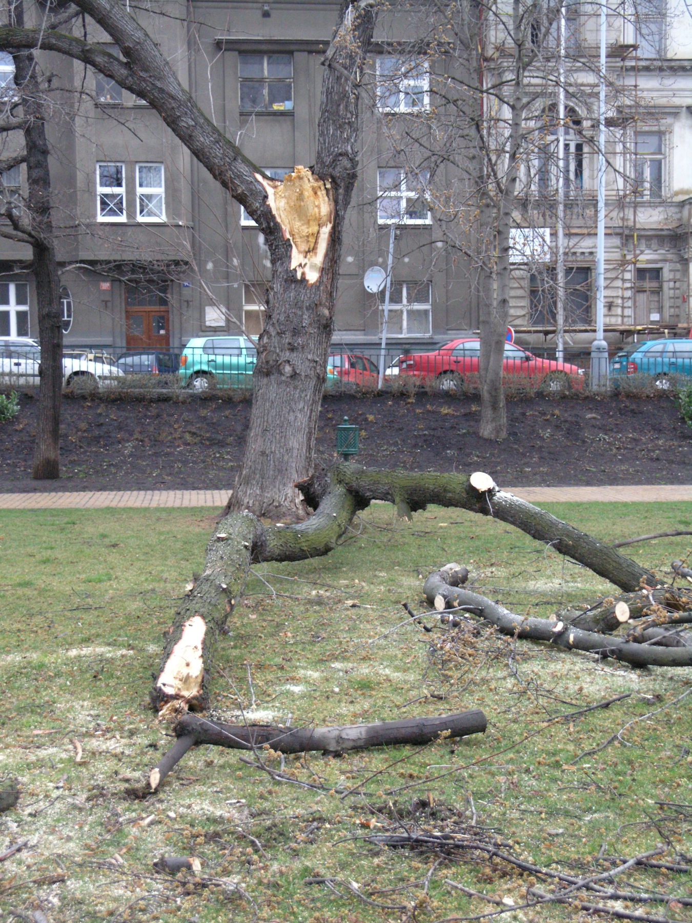 Praha, park Porthaimka - odklízení následků vichřice Emma